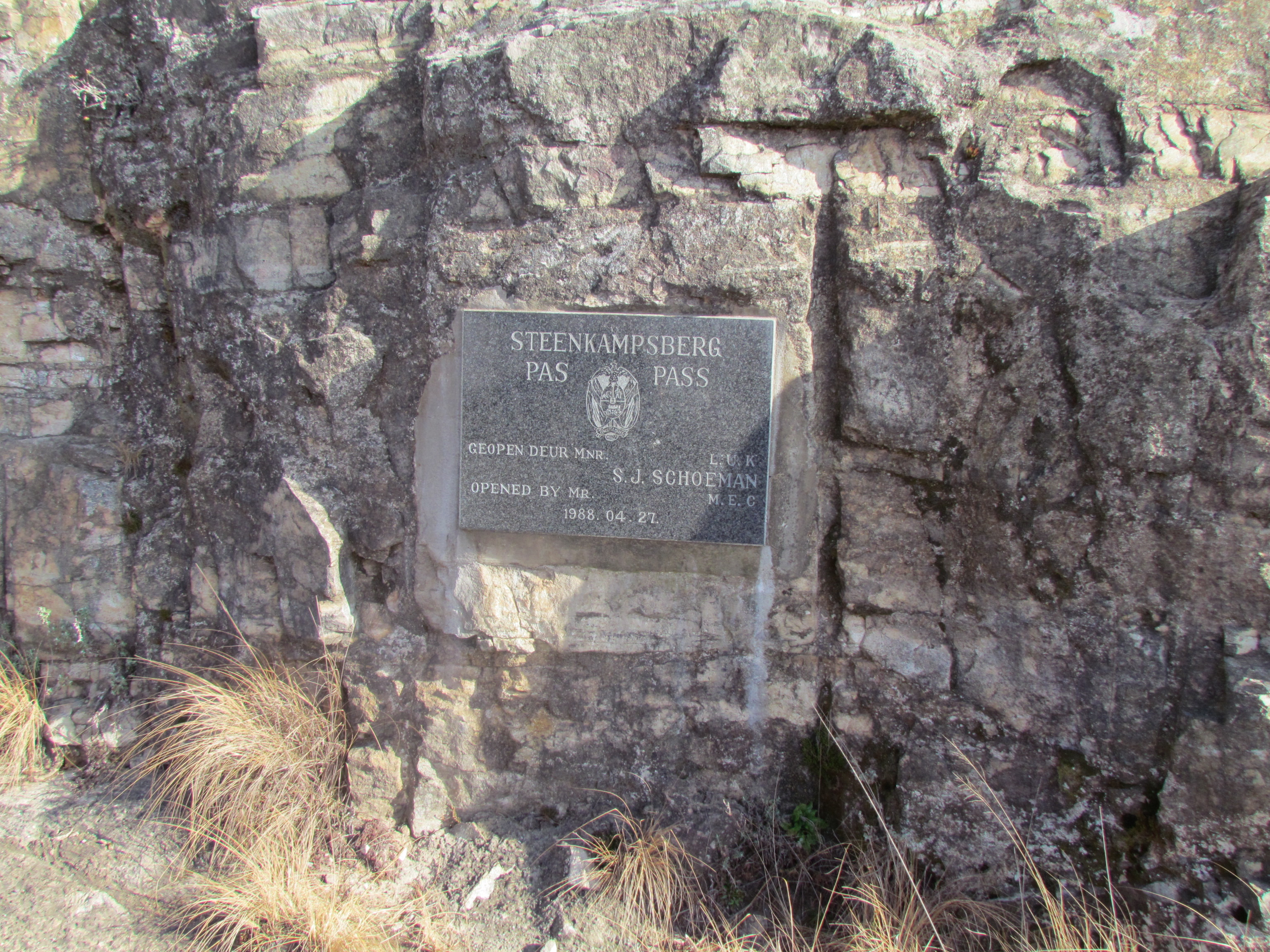 Gedenkteken op die Steenkampsbergpas